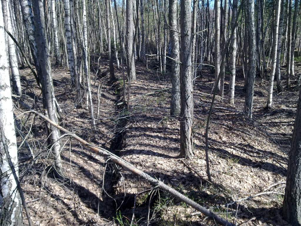 Pätkä Kilon turveradan penkkaa Turvesuolla